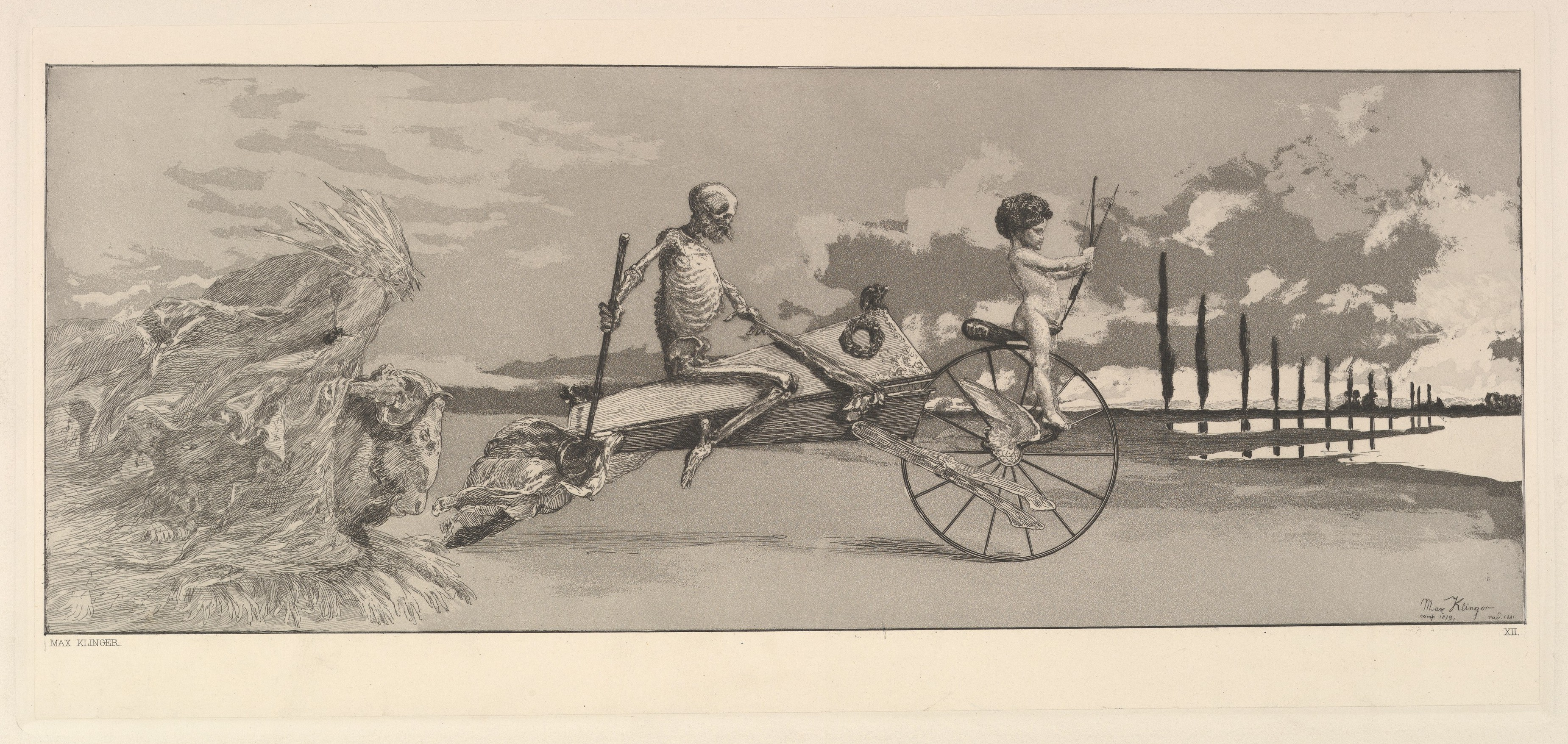 Portfolio; Portfolios